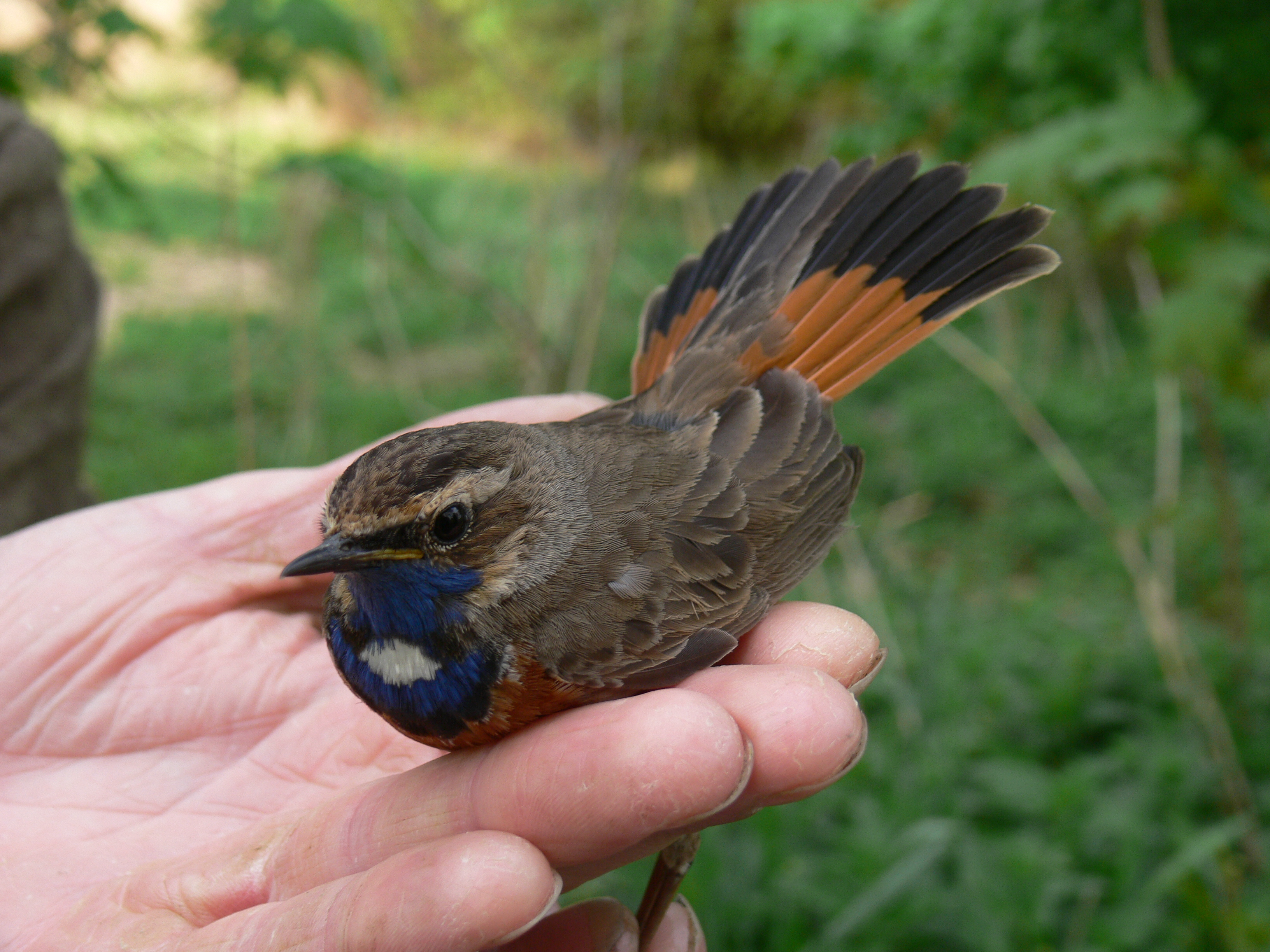 fotografie výlovů rybníka